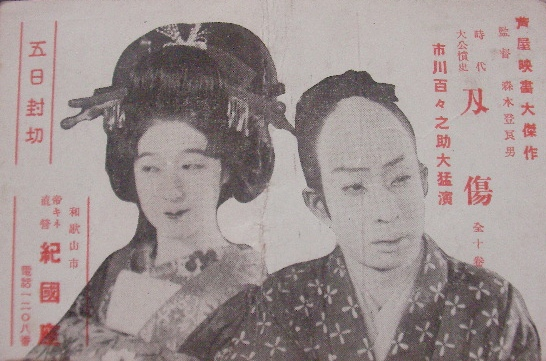 『刄傷』、1926年、帝国キネマ直営館チラシ